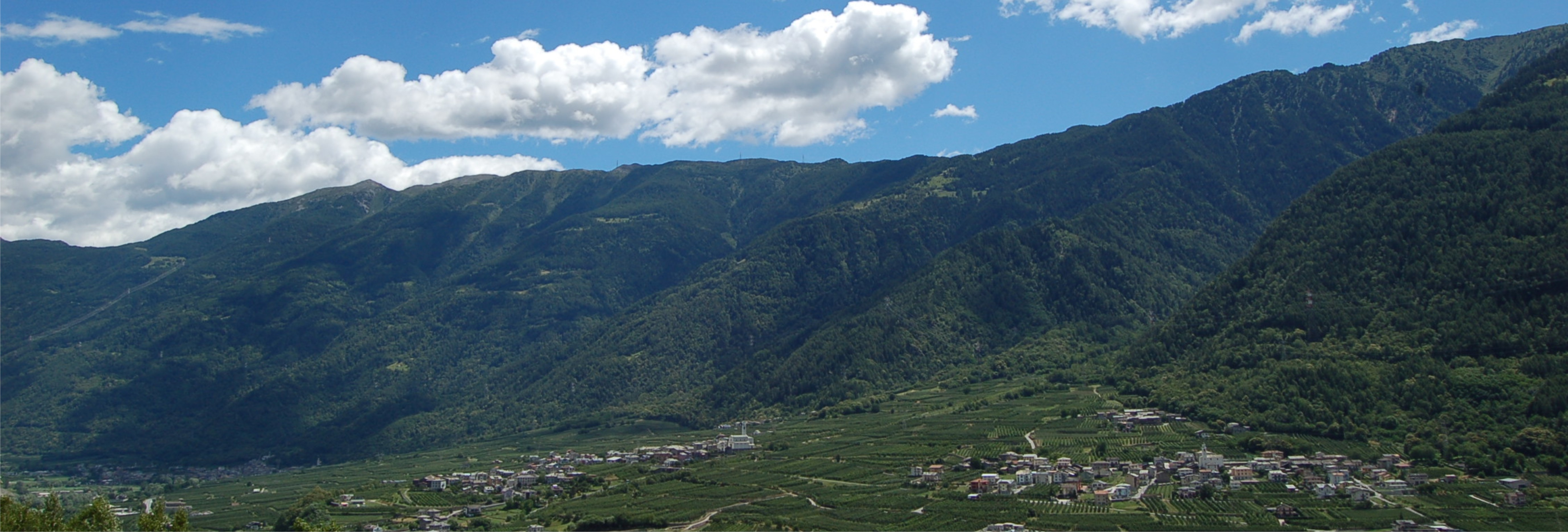 Vedeta da Baruffini delle Alpi Orobie - Tirano (SO)